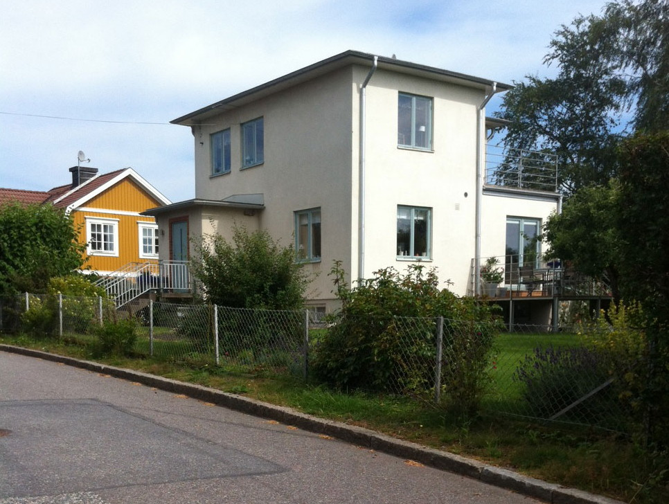 Funkisvilla på Hyltingevägen med 20-talsklassicism i bakgrunden